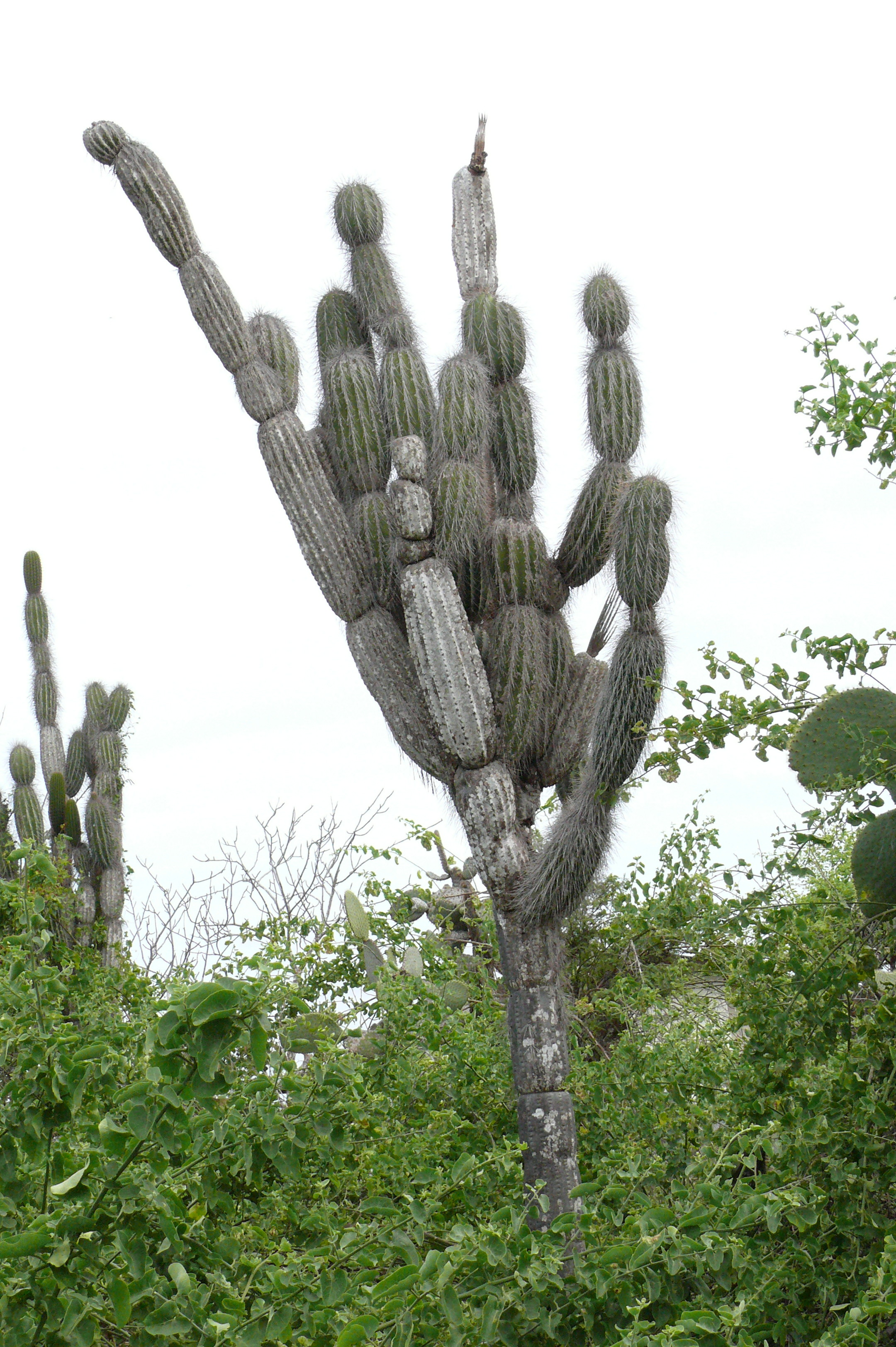 Galapagos-Säulenkaktus (Jasminocereus thouarsii)